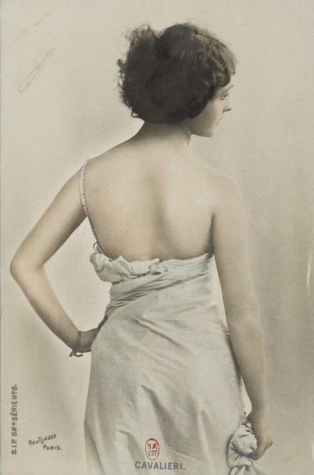 Porterait photographique de Lina Cavalieri entre 1900 et 1910.